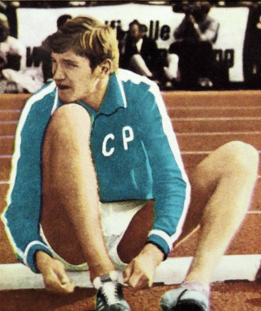 MUNCHEN 72-Figurina-Stickers-Panini-N° 88-SAPKA-URSS-recuperata